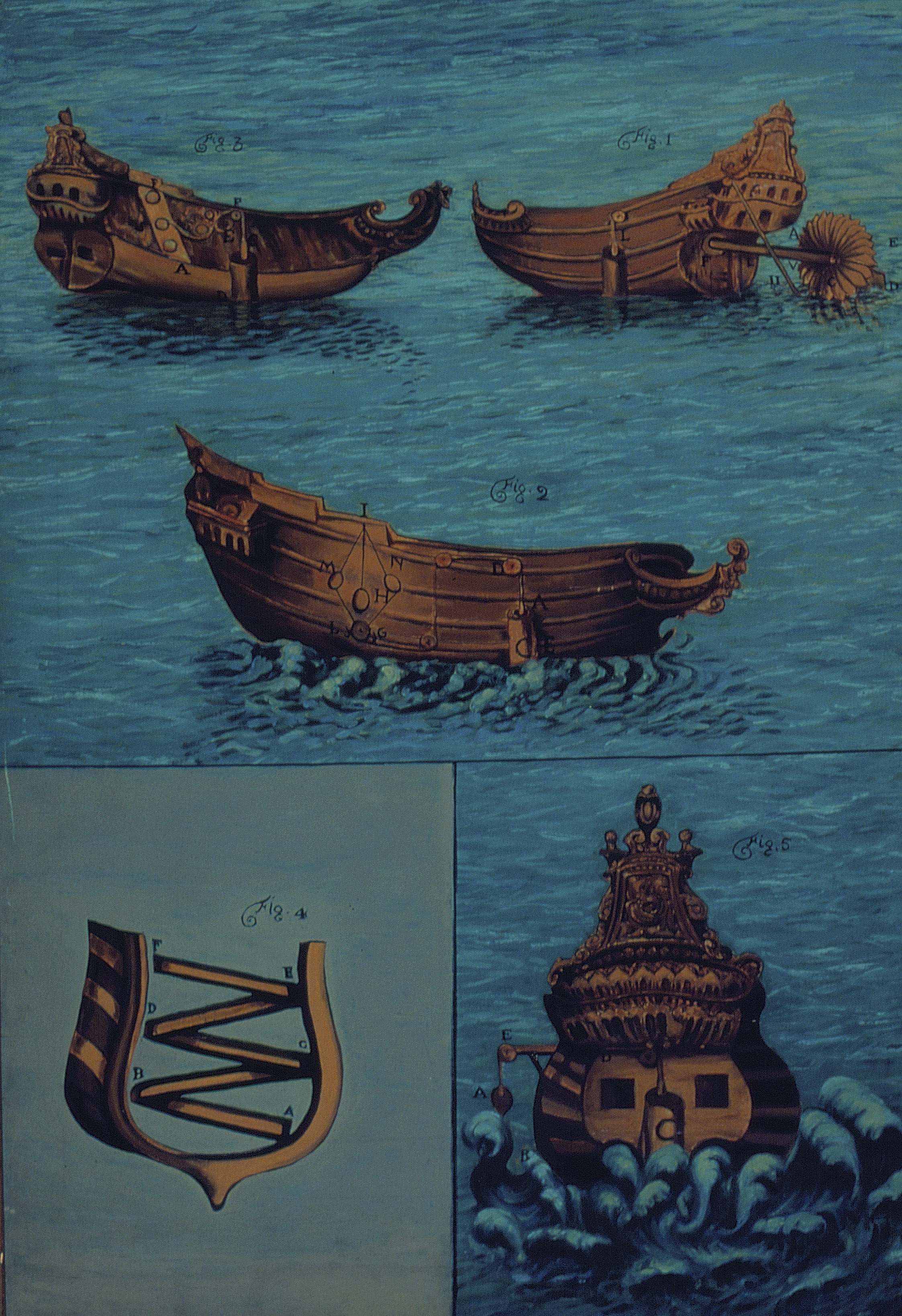 Obra que integra o acervo do Museu Paulista da USP. Coleção Fundo Museu Paulista - FMP